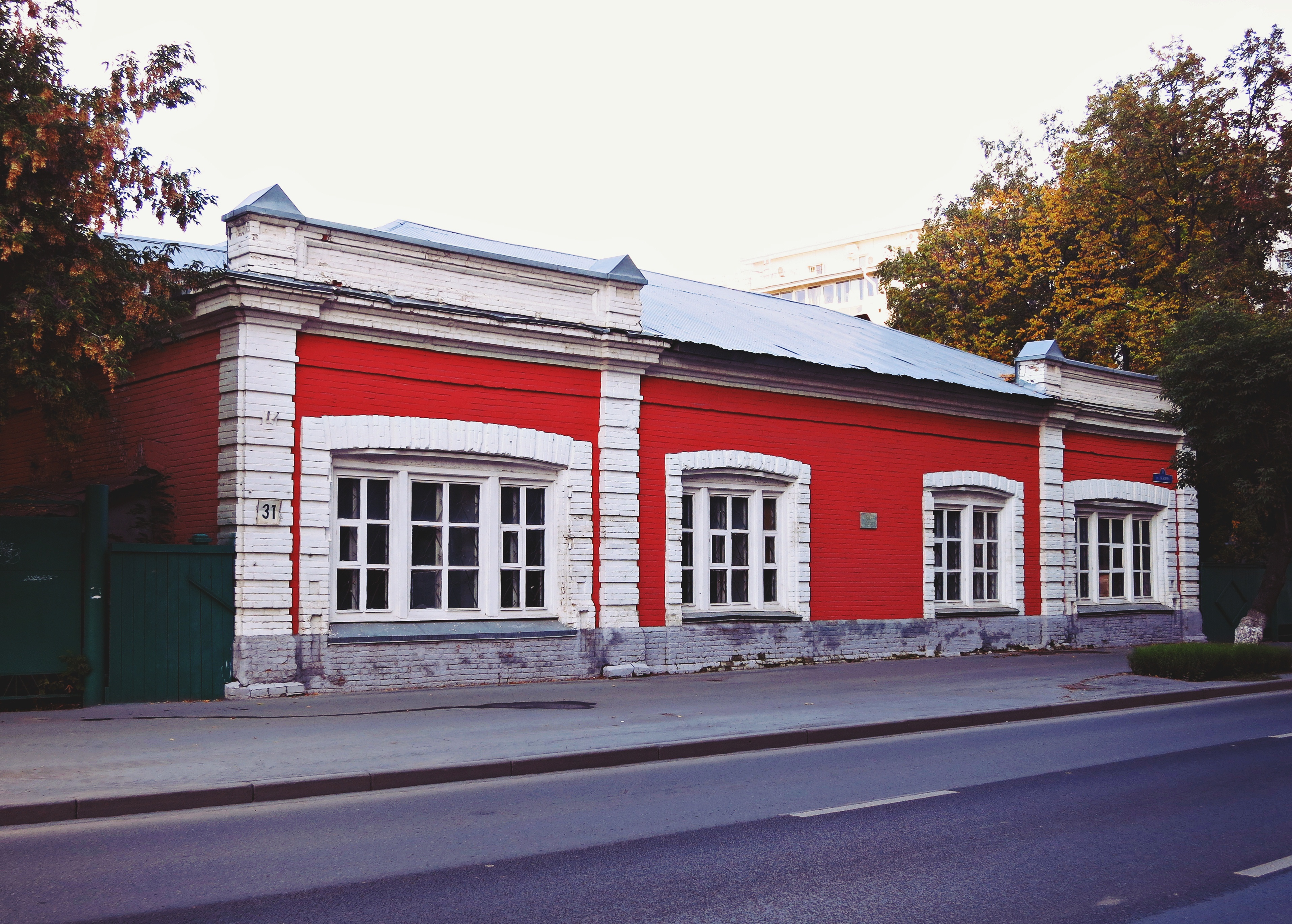 Магазин А.Ф. Поклевского-Козелла: улица Ленина, 31, Тюмень, Тюменская область